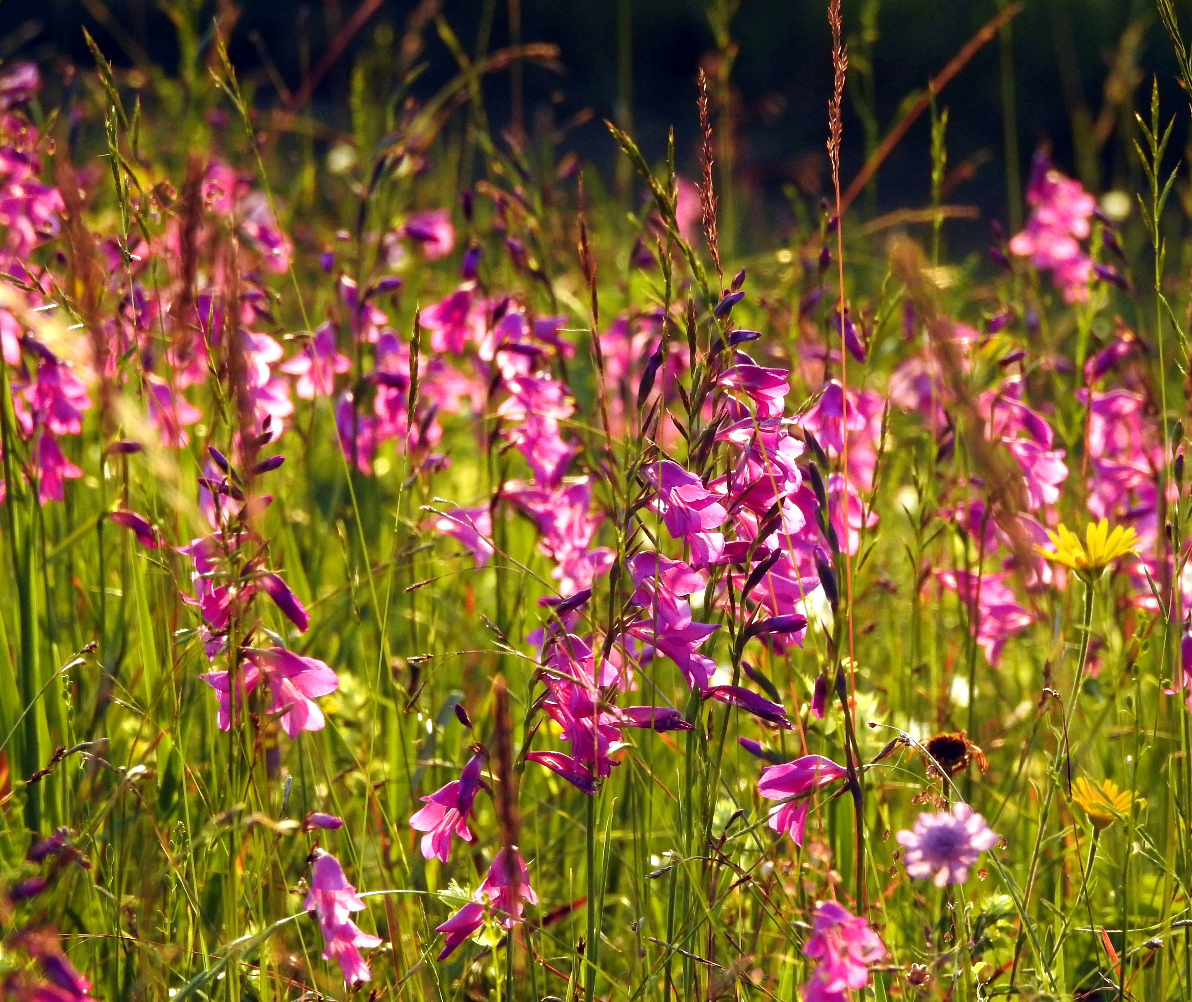 Andechs, OT Erling. Im frühen Hochsommer bezaubert ein Meer von purpurroten Blüten der Sumpf-Gladiole den Wanderer im Naturschutzgebiet „Mesnerbichl“.